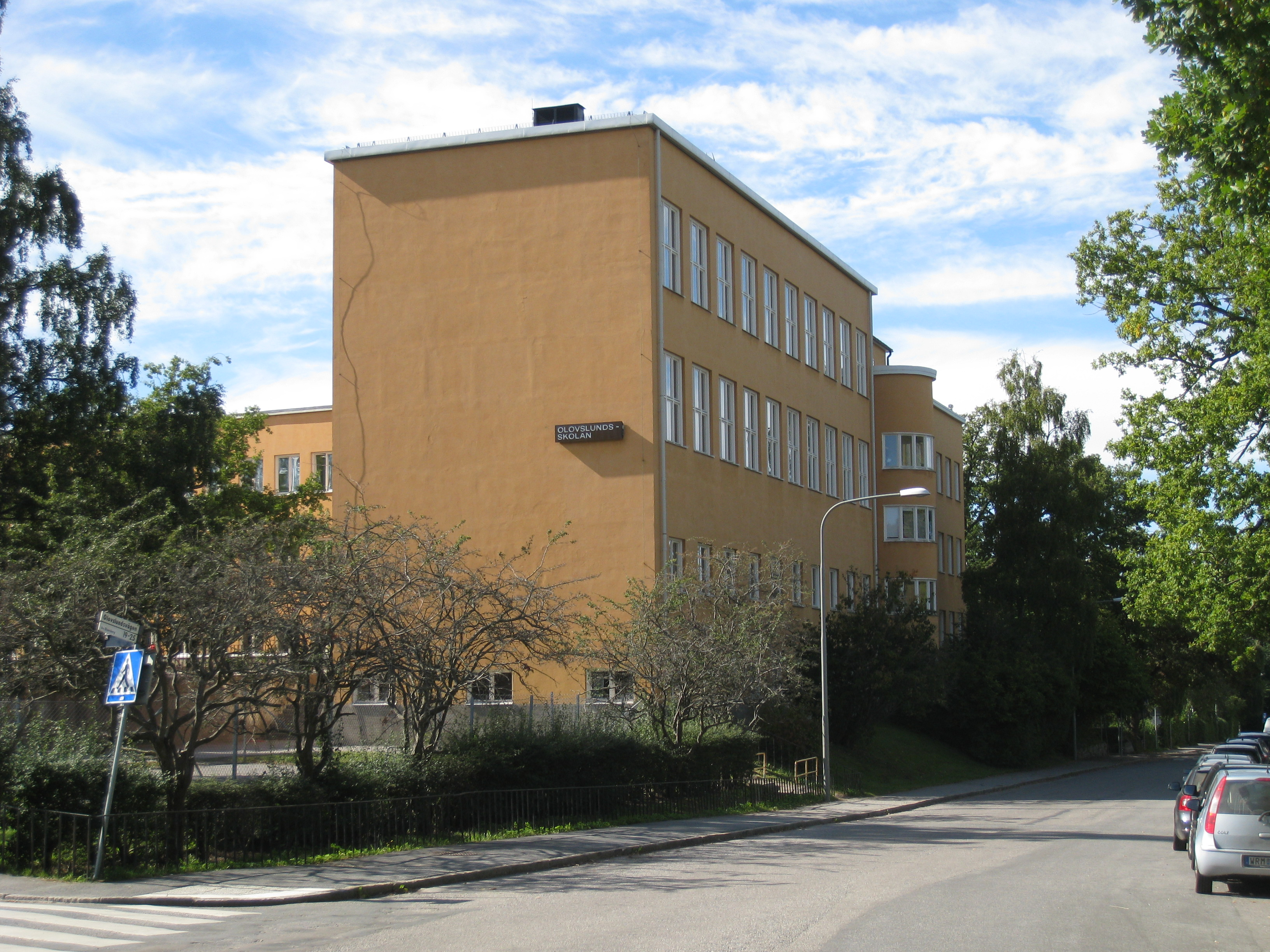 Olovslundsskolan på Gustav III:s väg 59-61 i Olovslund, Bromma. Skolan byggdes 1931 i en svängd form och ritades av arkitekt Paul Hedqvist (1895-1977). Här syns sidobyggnaden utmed Gustav III:s väg och skolans skylt på den västra fasaden.